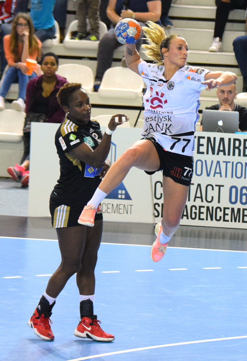 Camilla Herrem Le 03 avril 2016 lors du match aller de demi-finale de la Coupe des vainqueurs de coupe de handball Issy Paris Hand / Team Tvis Holstebro